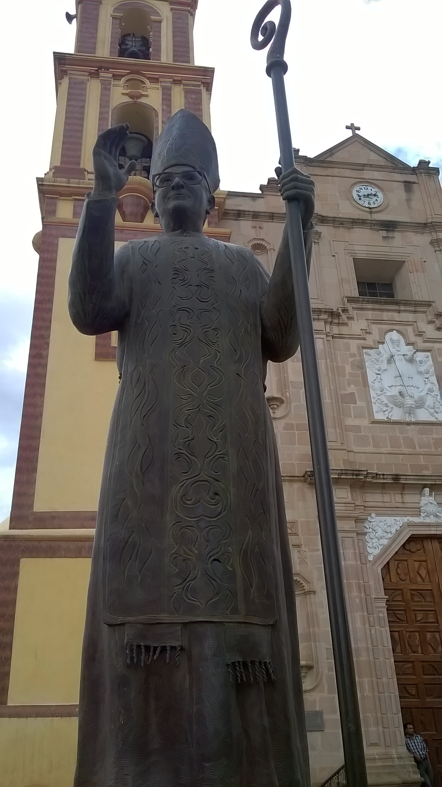 Mons. Bartolomé Carrasco Briseño